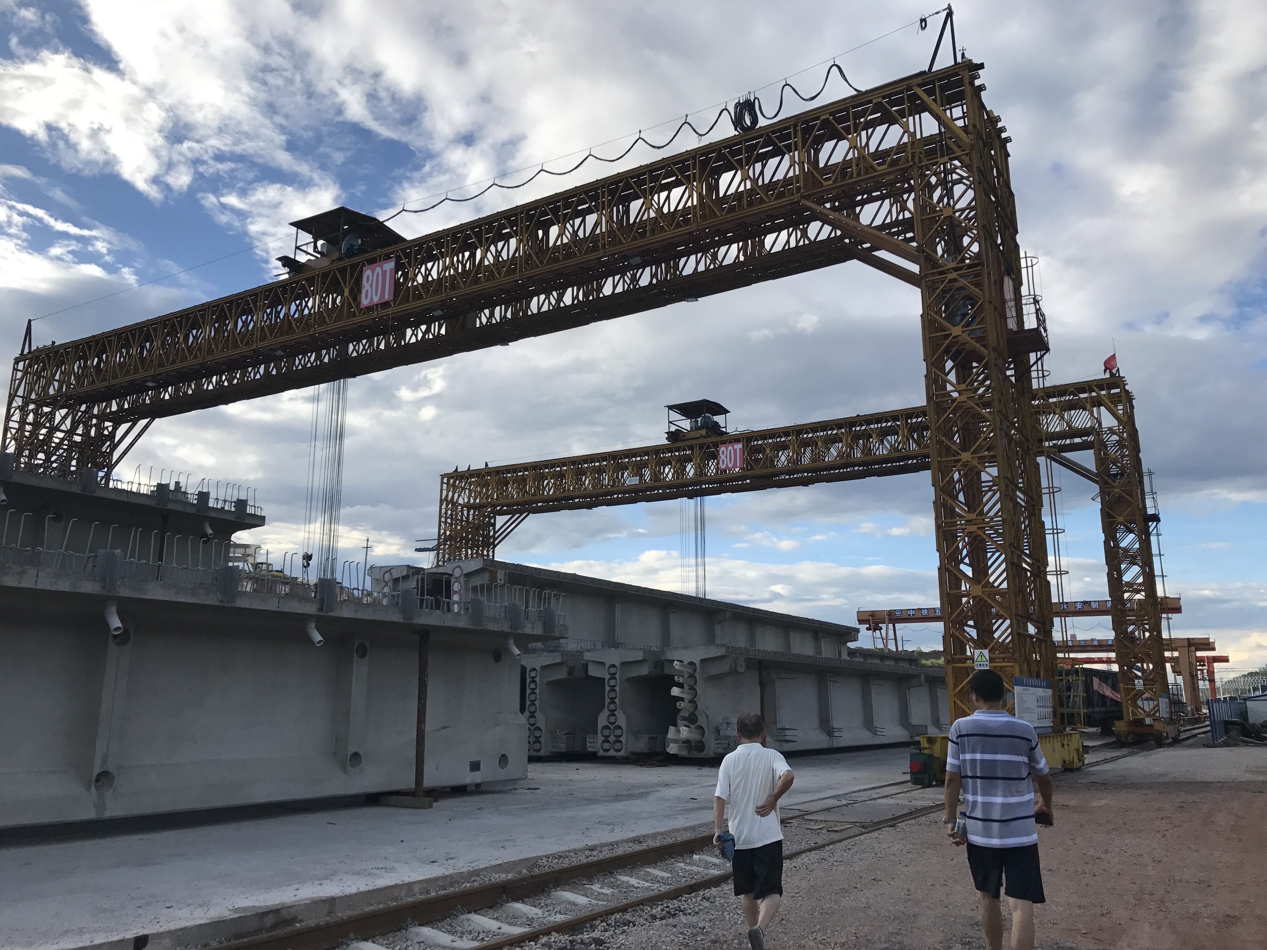 南三路铁路 工地 建设中